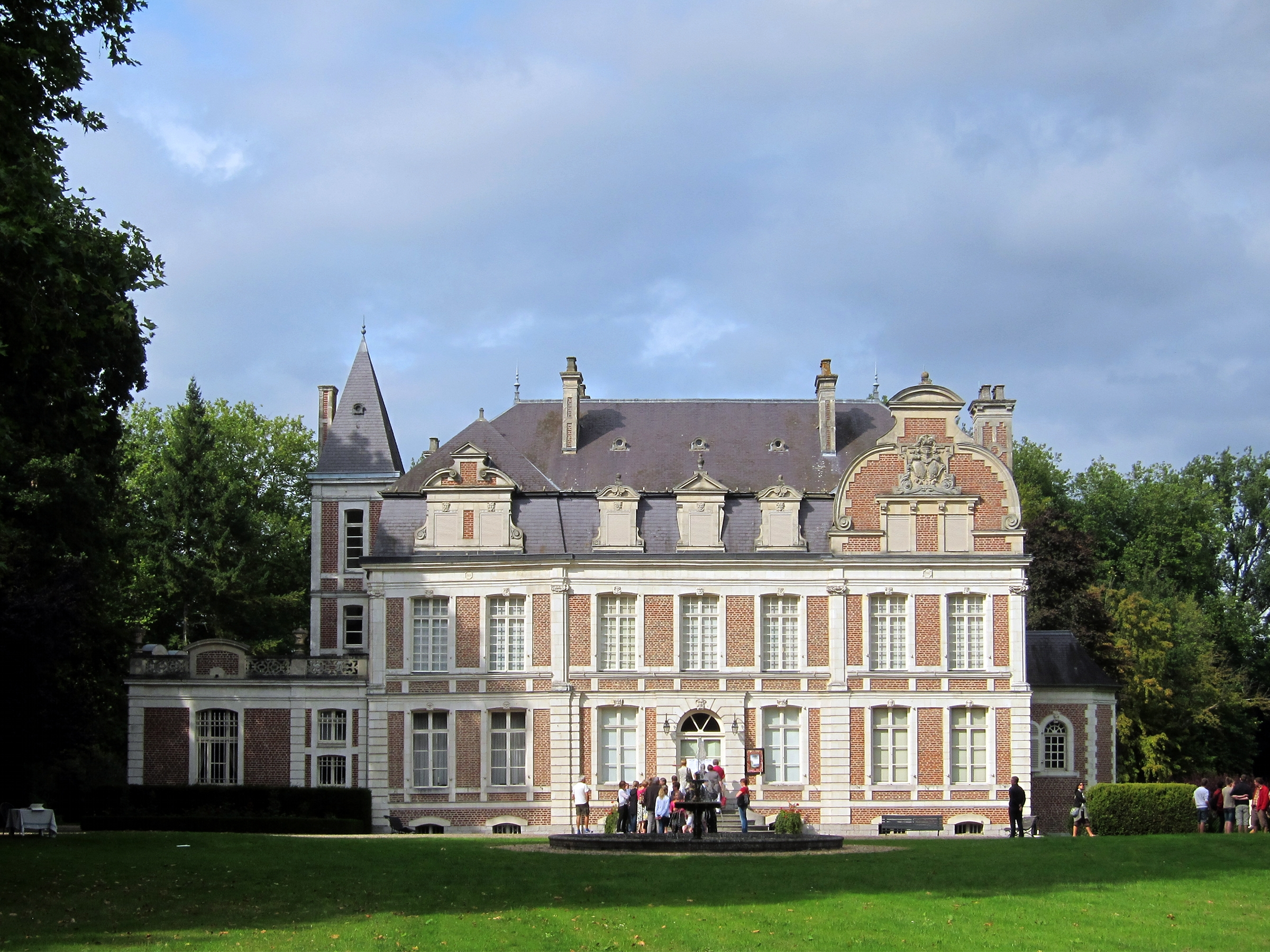 Le château de Laprée, des XVIIIe et XIXe siècles, situé à Quiestède, dans le Pas-de-Calais. .